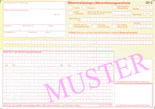 KV- u. Überweisungsschein